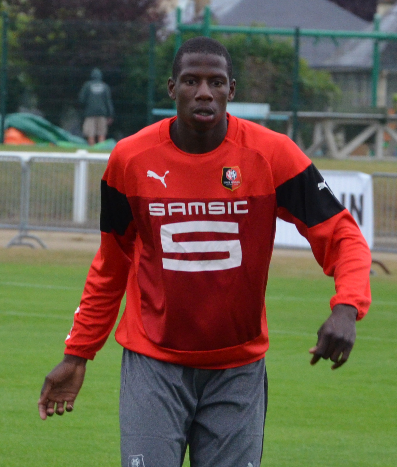 Photo prise lors de l'échauffement des joueurs du Stade rennais avant un match amical face à l'US Orléans au stade Paul-Audrin de Dinard. Ici, Abdoulaye Doucouré.